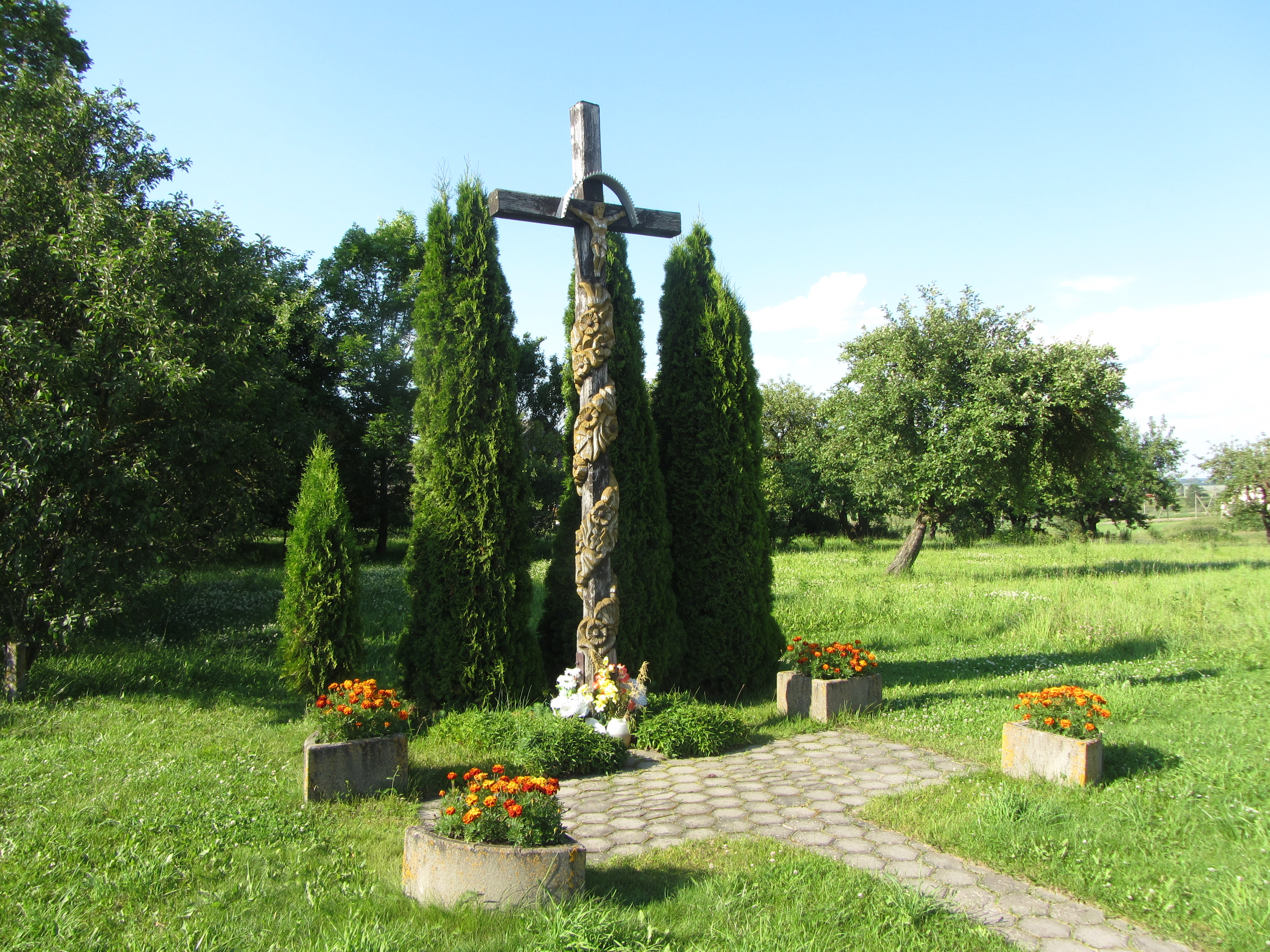 Svirkos, Lithuania